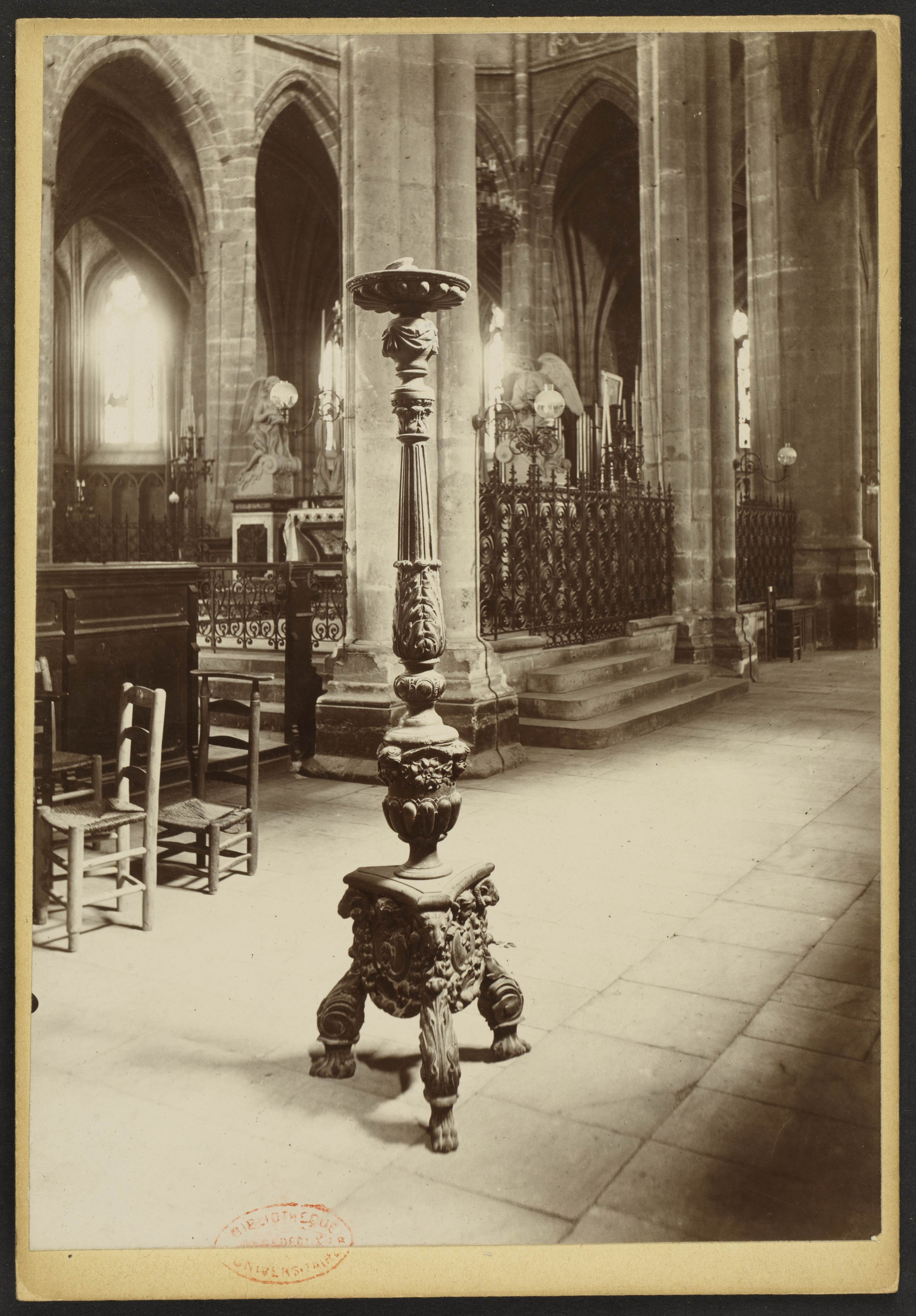 Cathédrale Saint-Jean-Baptiste de Bazas; Chandelier Pascal